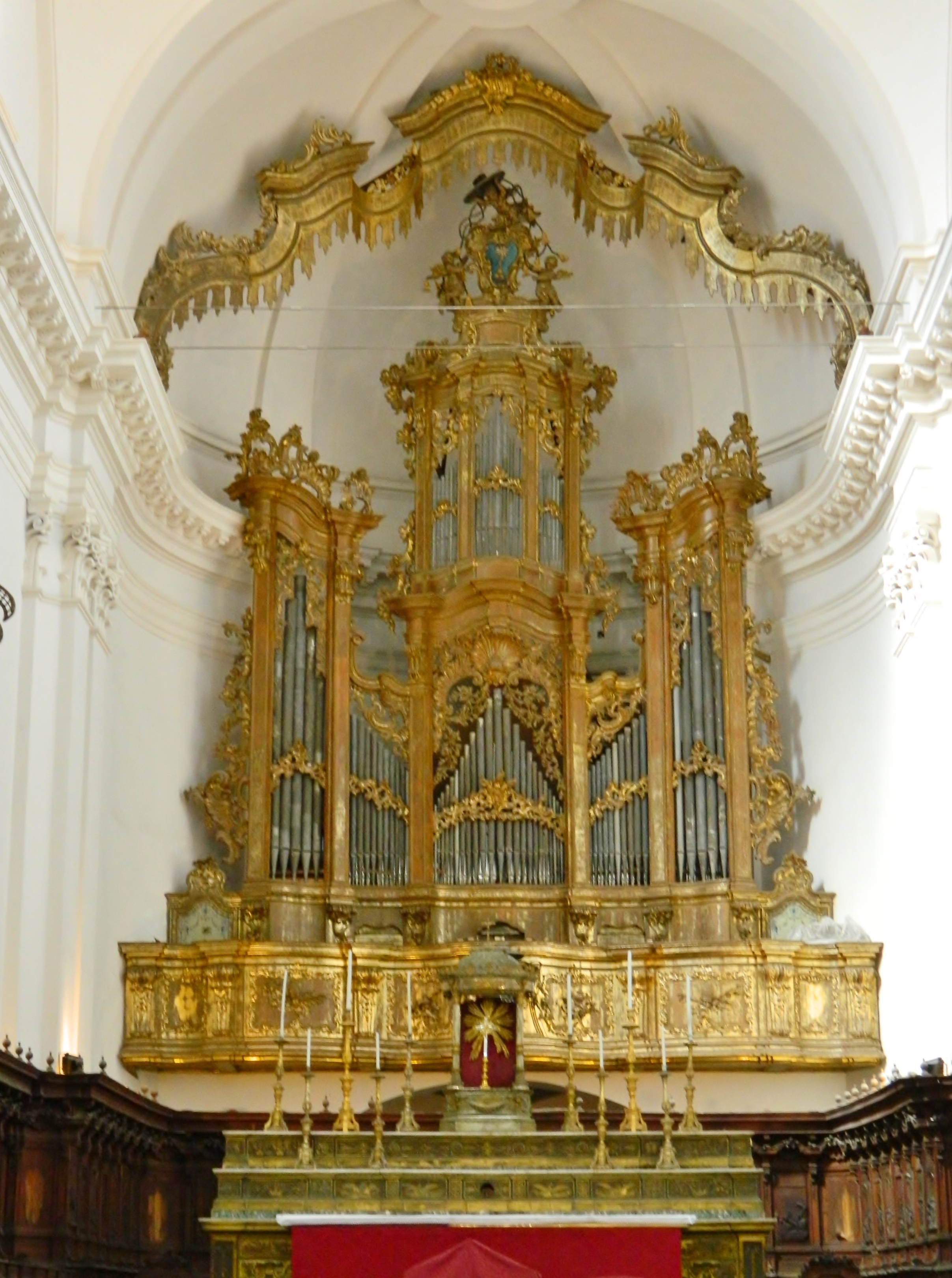 A San Nicolò l'Arena templom orgonája, Donato Del Piano (1755-67)